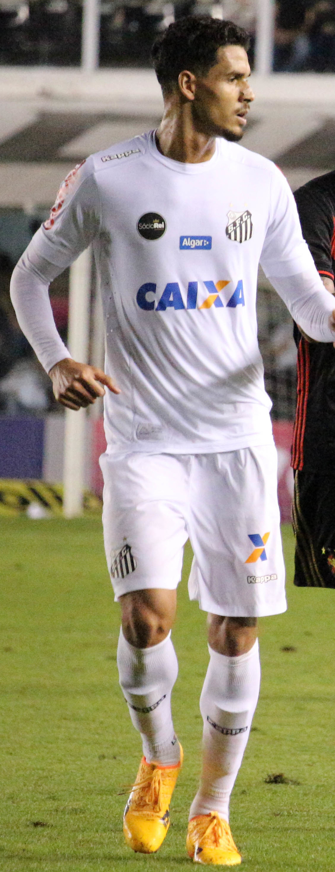 Foto: Douglas Teixeira/Futebol Santista